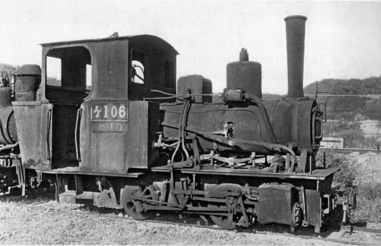 国鉄ケ100形蒸気機関車ケ107、深川造船所製。登録上はケ107だが、実車の表記はケ106となっていた。横須賀線久里浜駅にて。